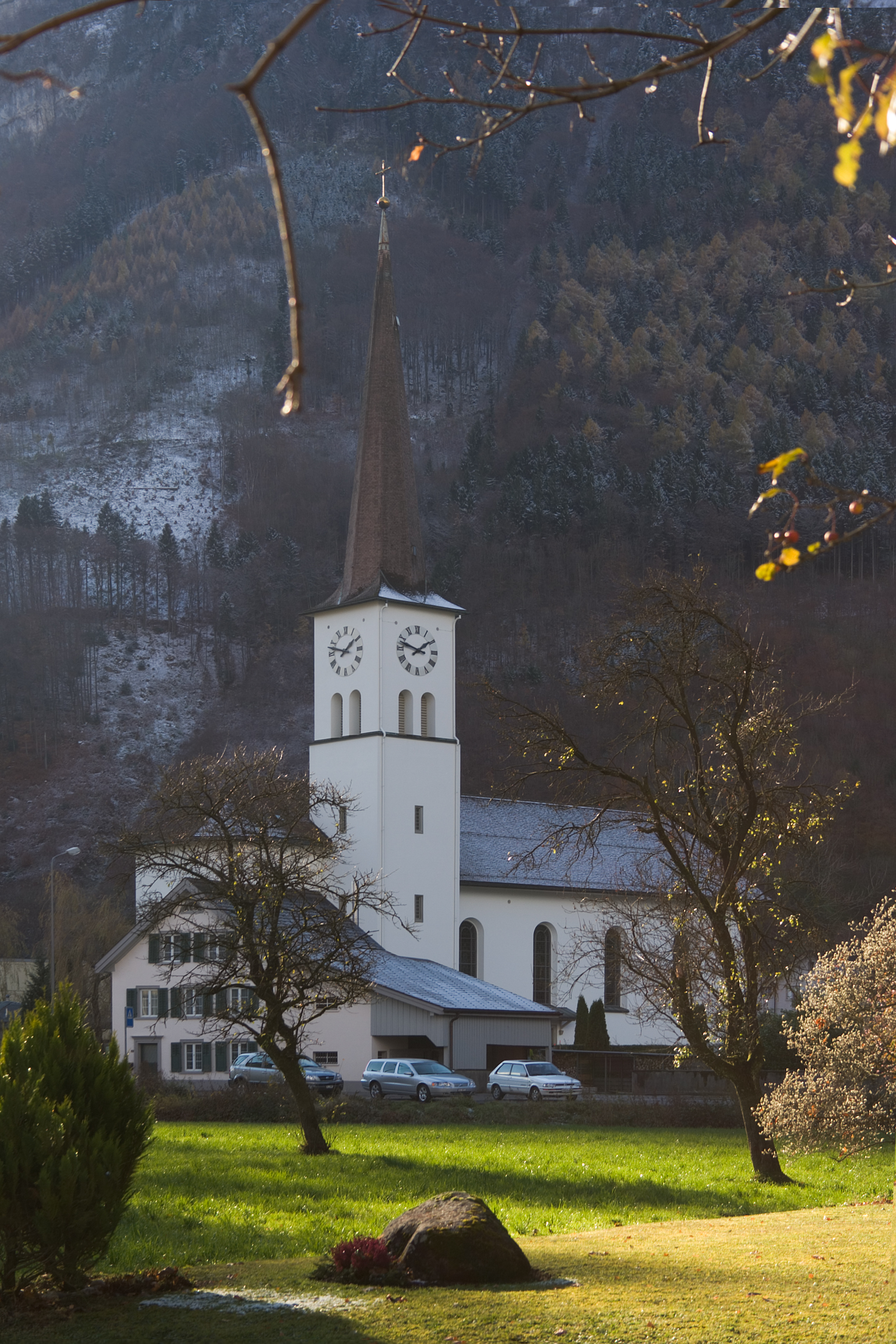 Katholische Kirche Oberurnen, SchweizErbaut 1864-68 durch Karl Reichlin